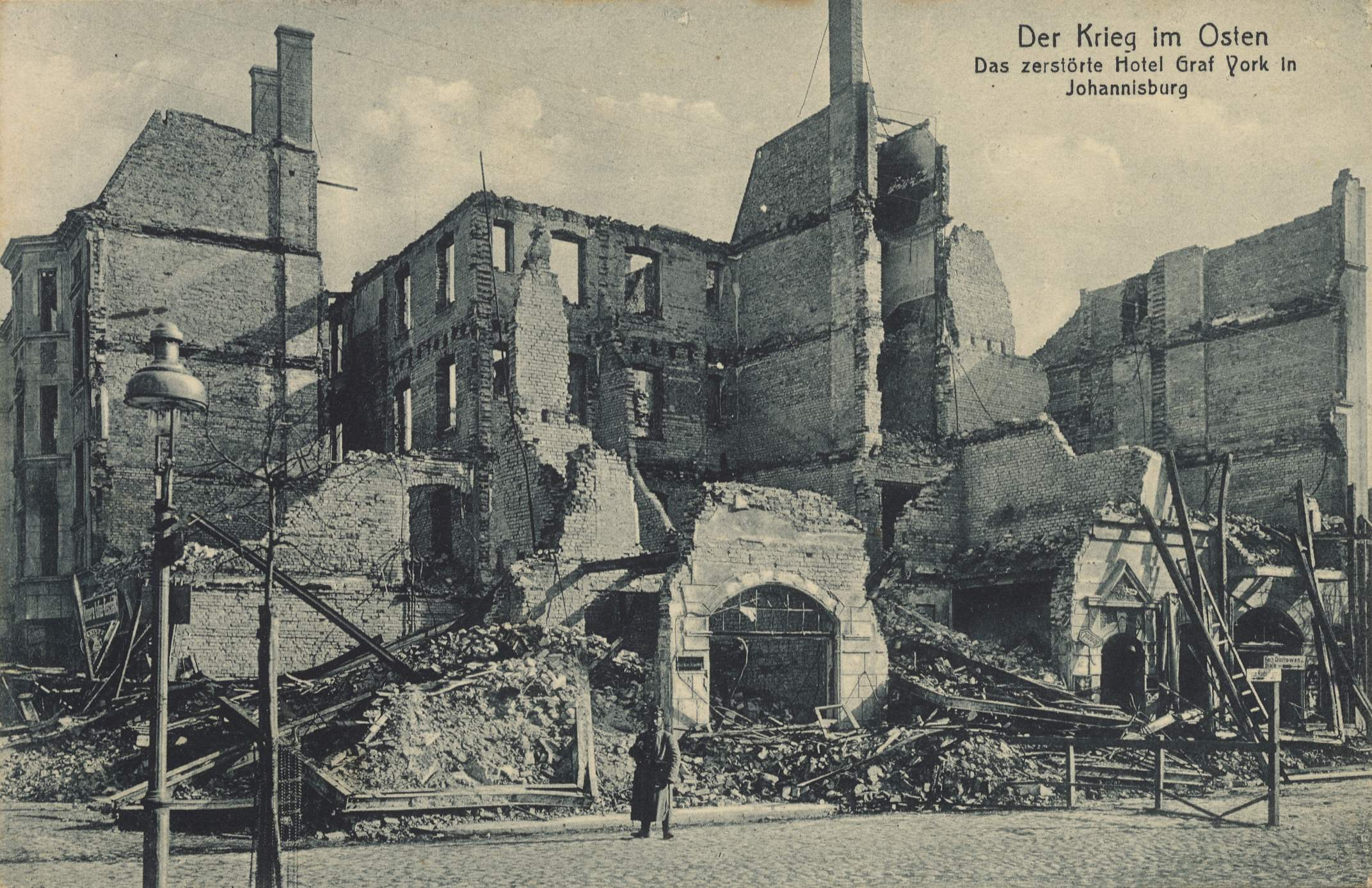 Hotel Graf York in Johannisburg